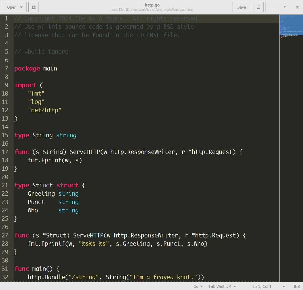 جی‌ادیت نسخهٔ ۳٫۲0٫۱ در حال ویرایش یک سند گو